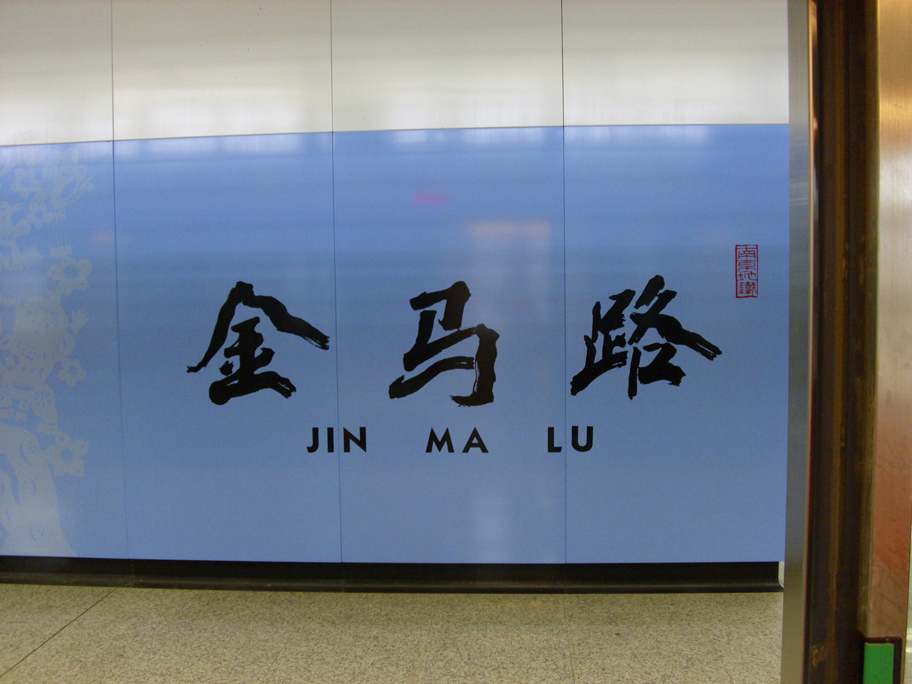 南京地铁2号线 金马路站